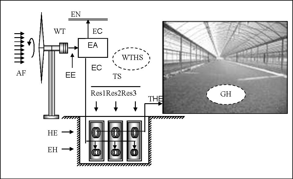 Вітротурбінна система теплопостачання теплиці